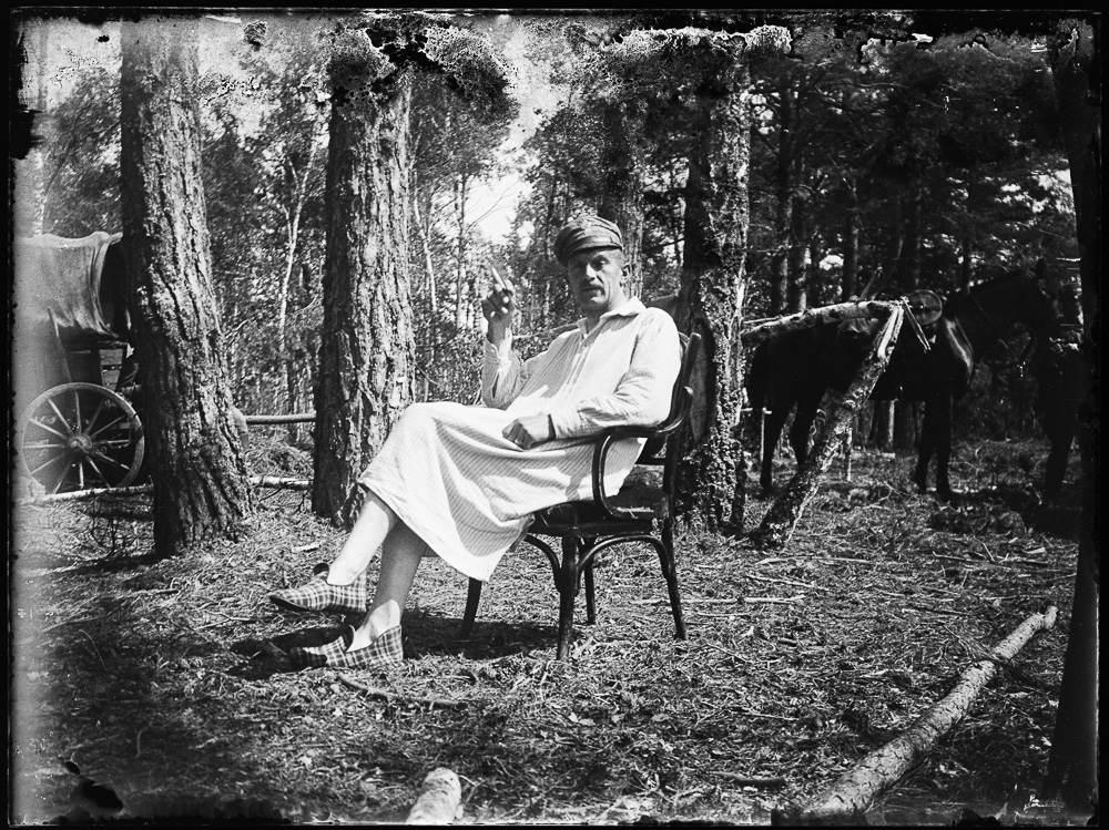 Na zdjęciu widzimy legionistę w koszuli nocnej, typowej dla noszonej przez podoficerów C.K. Armii. Tym żołnierzem jest sam autor zdjęcia, chor. Stanisława Janowskiego. Zdjęcie wykonano najprawdopodobniej w formie żartu. Fotografię wykonano w obozie Legionów Polskich pod Piaseczną na Wołyniu w roku 1916.